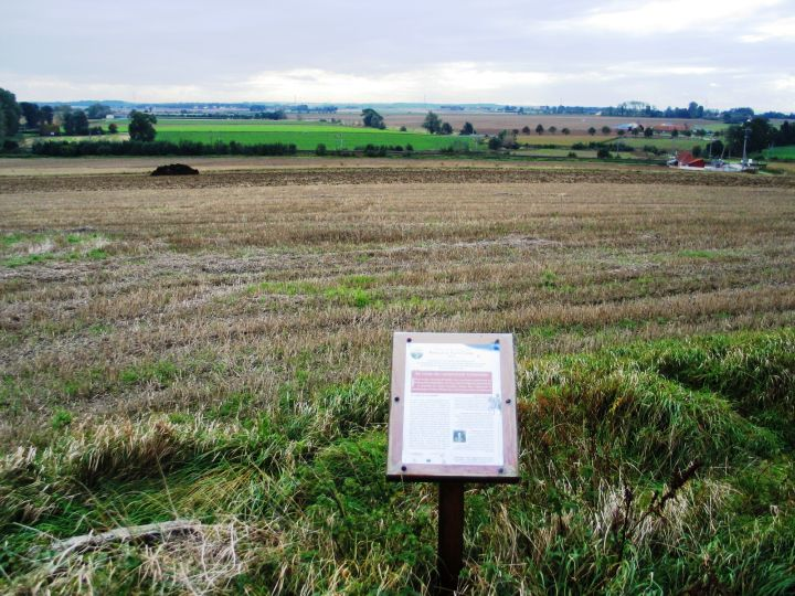 slagveld Kassel 1677 - eigen foto